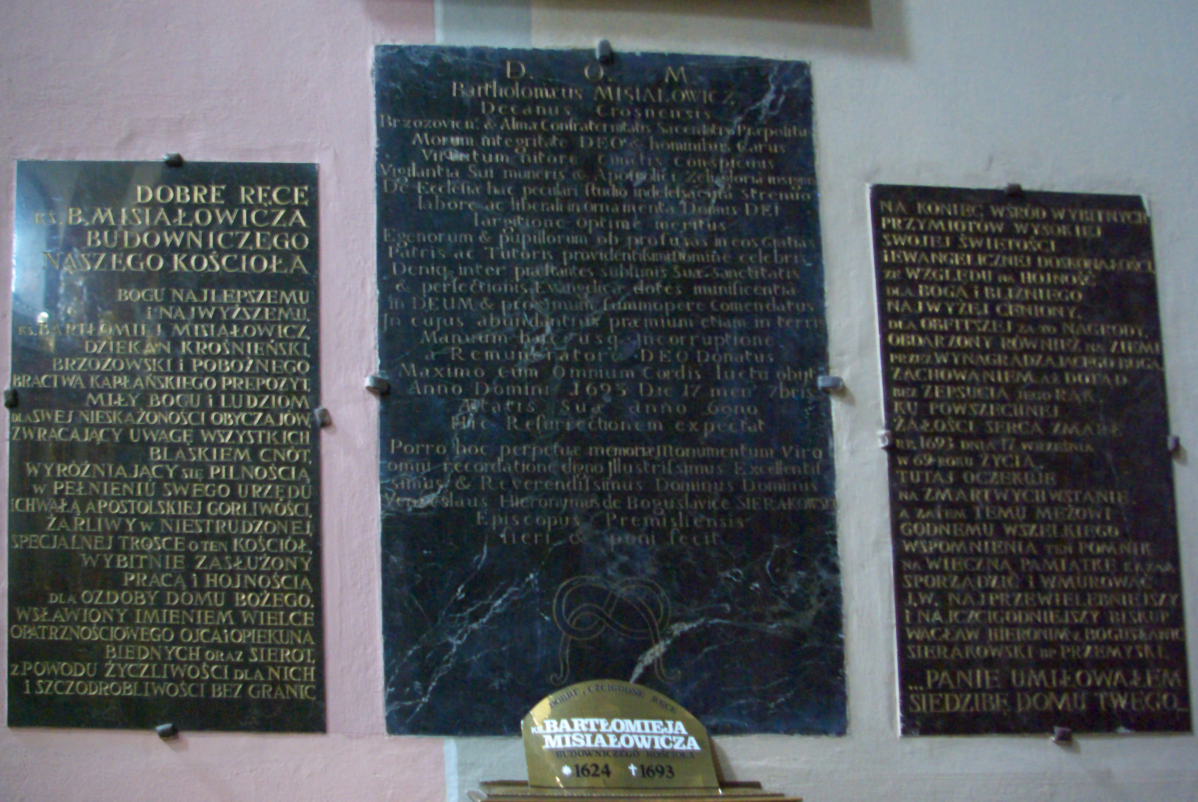 Epitafium Bartłomieja Misiałowicza w kościele Przemienienia Pańskiego w Brzozowie.